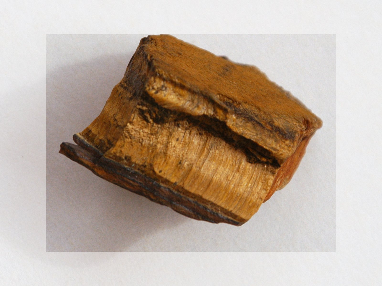 Rohes Tigerauge